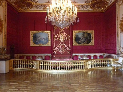 Hôtel de Soubise- Archives nationales (France)